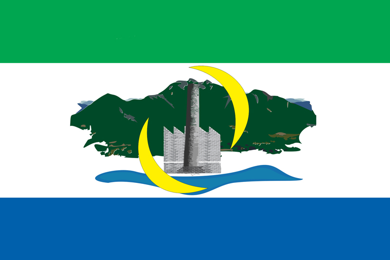 Bandeira da Cidade de Serra - Espirito Santo